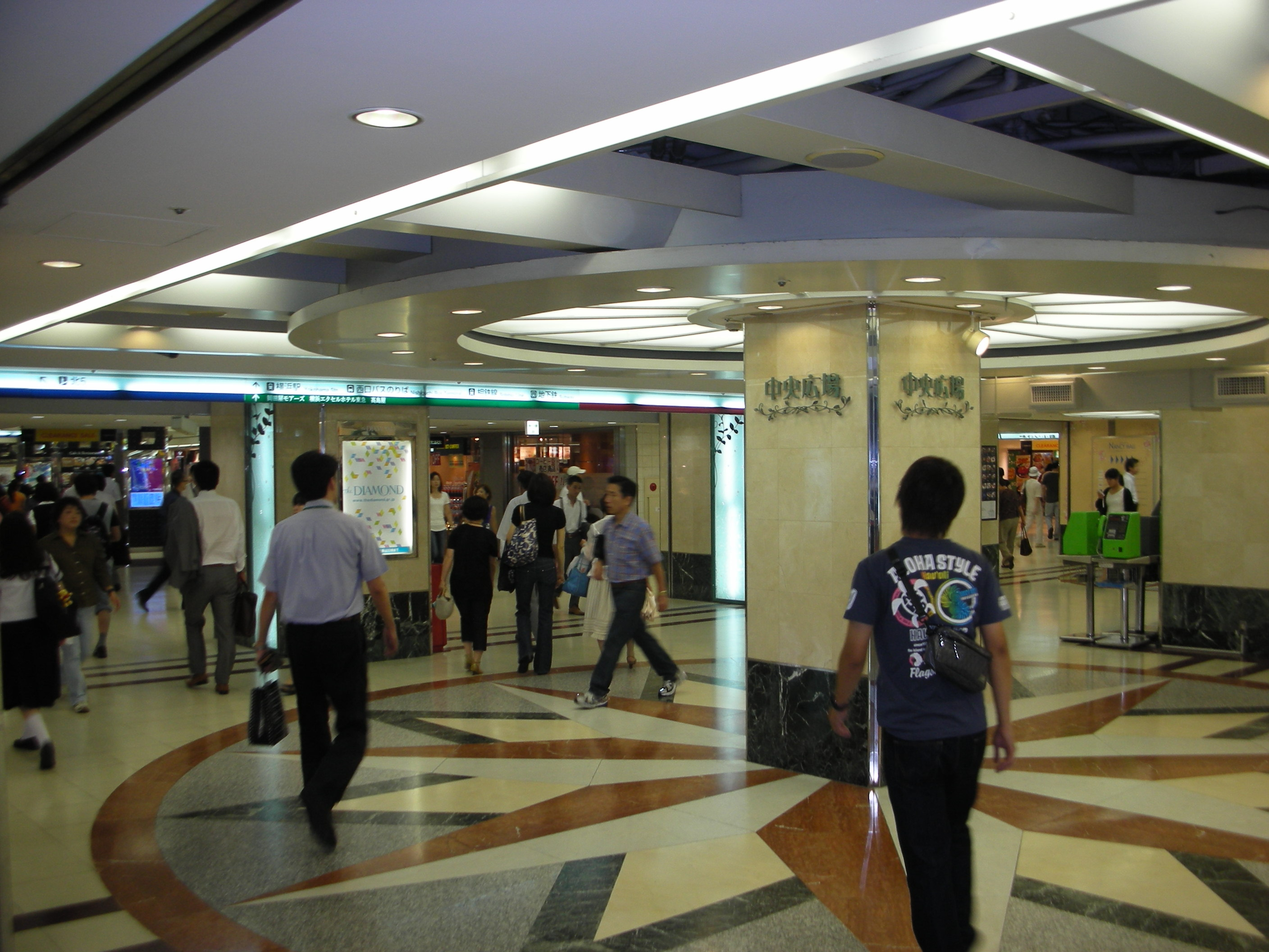 ザ・ダイヤモンド（横浜駅西口地下街）。